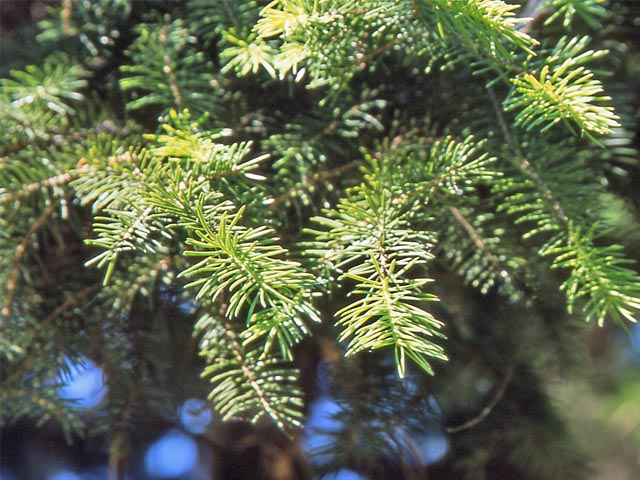 ヒメバラモミの針葉、東京・小石川植物園で撮影。 Hojas de Picea maximowiczii. Jardin botanico de Koishiwawa, Tokyo, Japon.